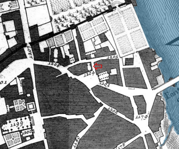 Pianta di Nolli